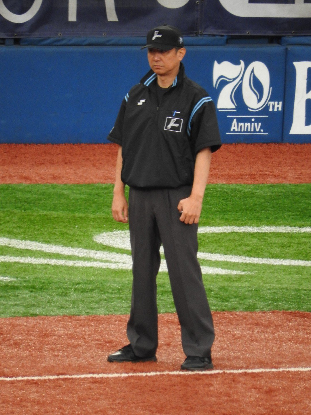 2019年10月6日横浜スタジアムにて